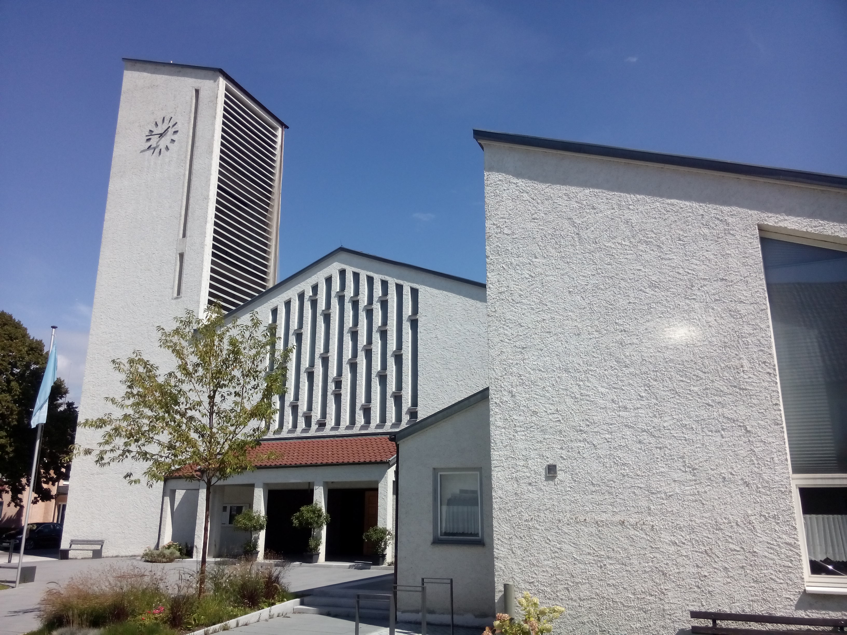 Kirchturm, Eingang Gemeindezentrum